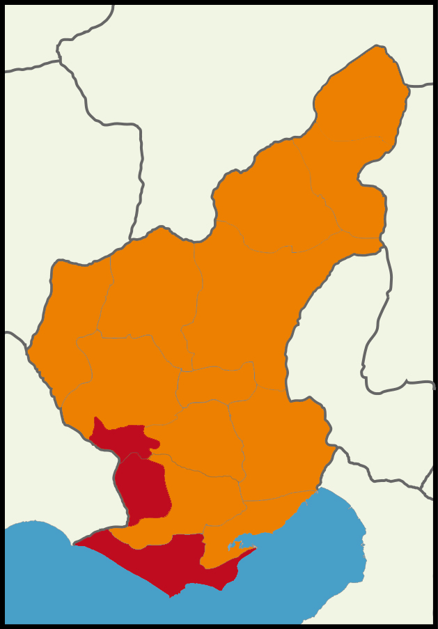 Sarı: AKP Kırmızı: CHP